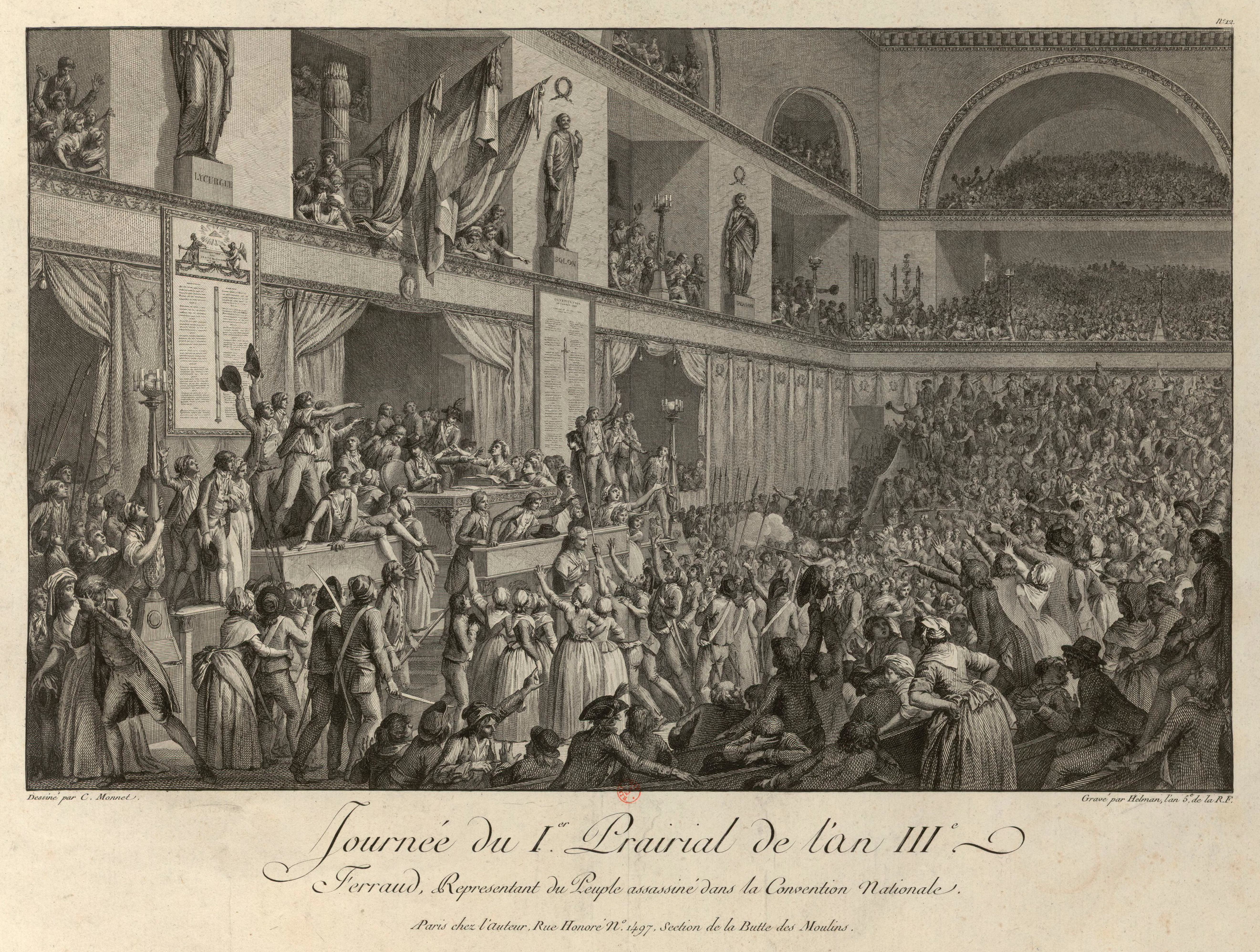 L'insurrection du 1er prairial an III (20 mai 1795) et l'assassinat du député Jean-Bertrand Féraud. Gravure de Duplessis-Bertaux et Helman d'après un dessin de Charles Monnet.